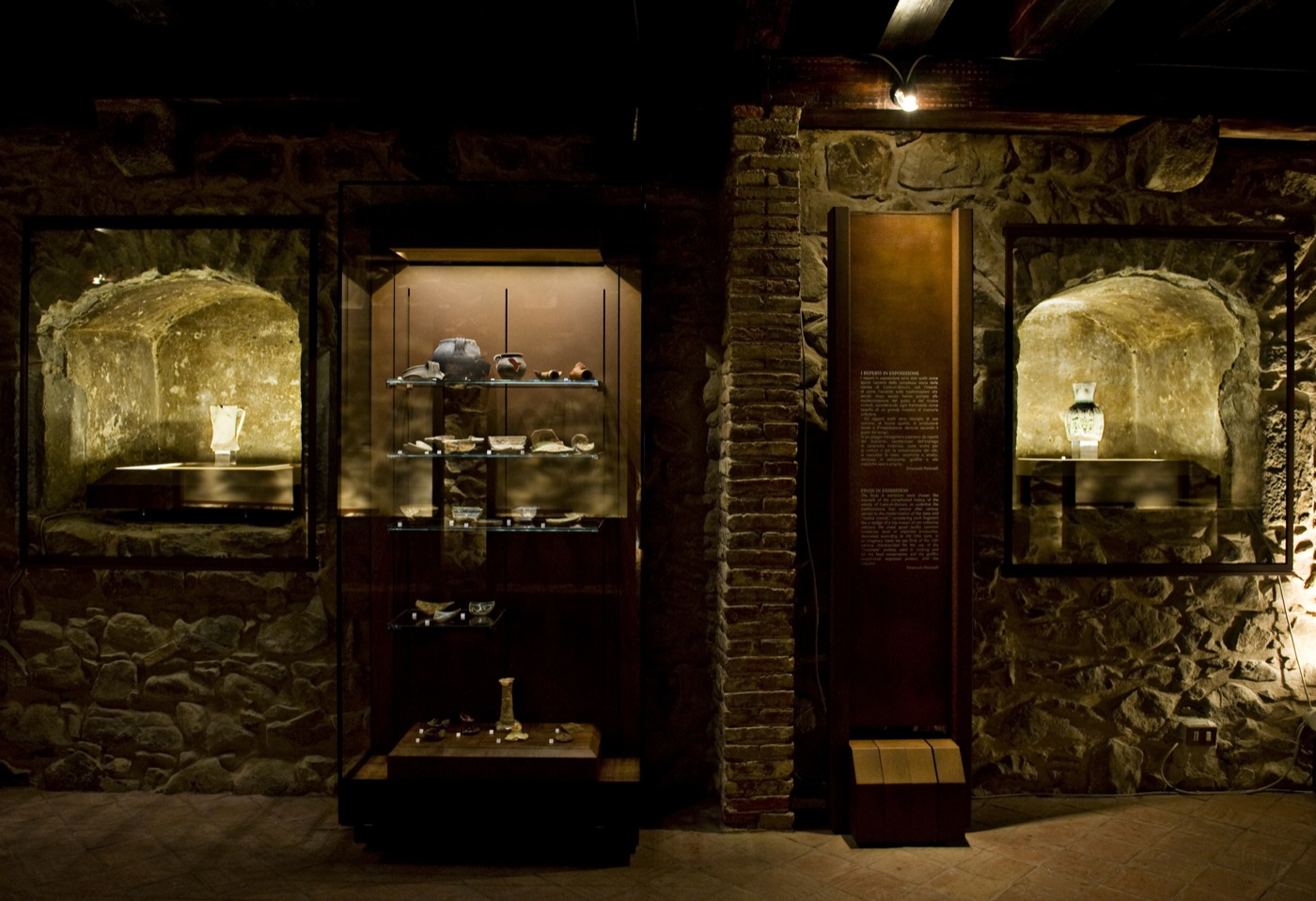 vetrina con reperti